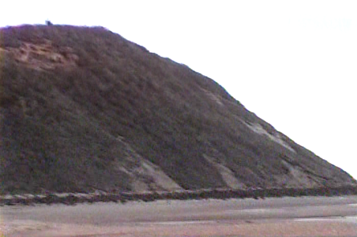 Cabo San Pablo, océano Atlántico, sector este de la isla Grande de Tierra del Fuego, en la región austral de América del Sur. Pertenece al departamento Río Grande, de la provincia de Tierra del Fuego, Antártida e Islas del Atlántico Sur en el sur de la Patagonia argentina.